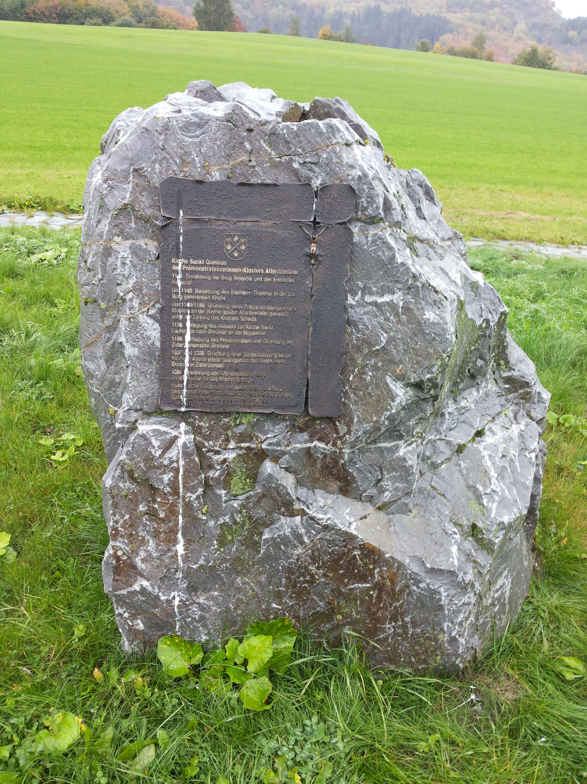 Gedenkstein Kirche Sankt Quirinus bei Brilon-Rösenbeck (Germany)